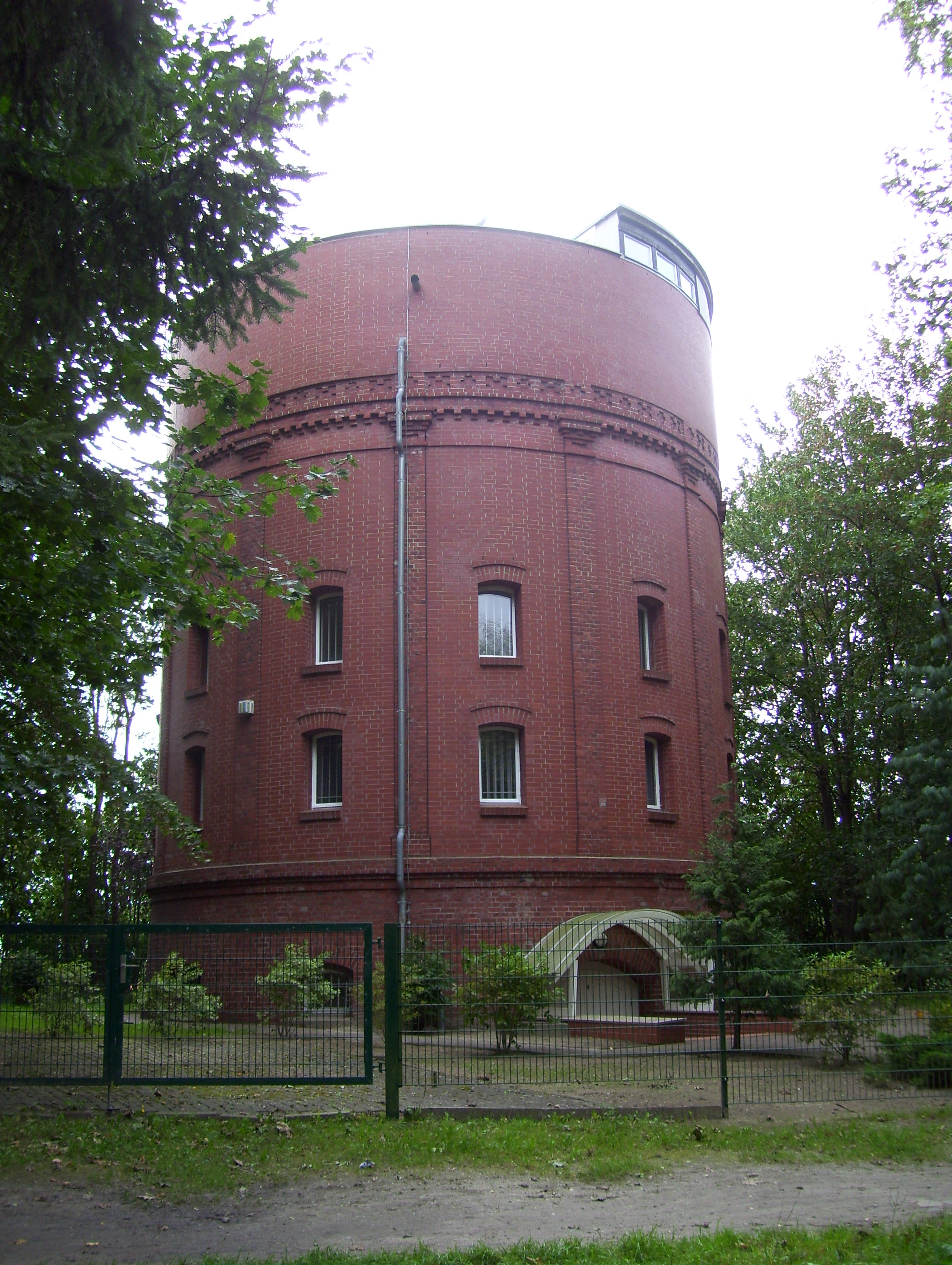 Ehemaliger Wasserturm in Demmin, heute Sternwarte und Planetarium